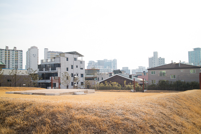 서울선농단